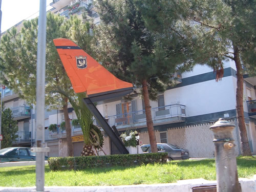 Piazzetta Volturino, Canosa. 2007